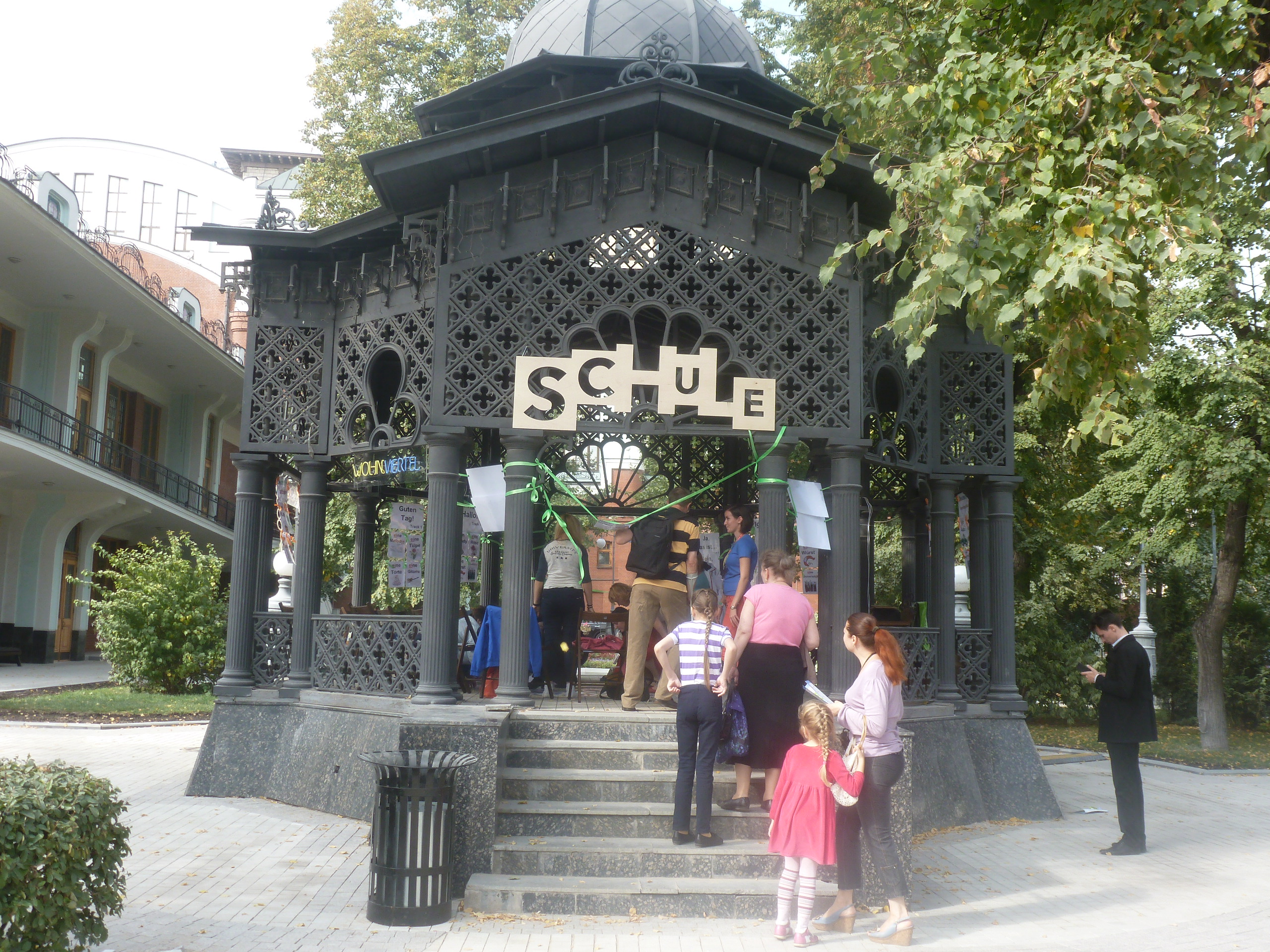 Festivalo de germana lingvo en Moskvo, Rusio, en jaro 2014.